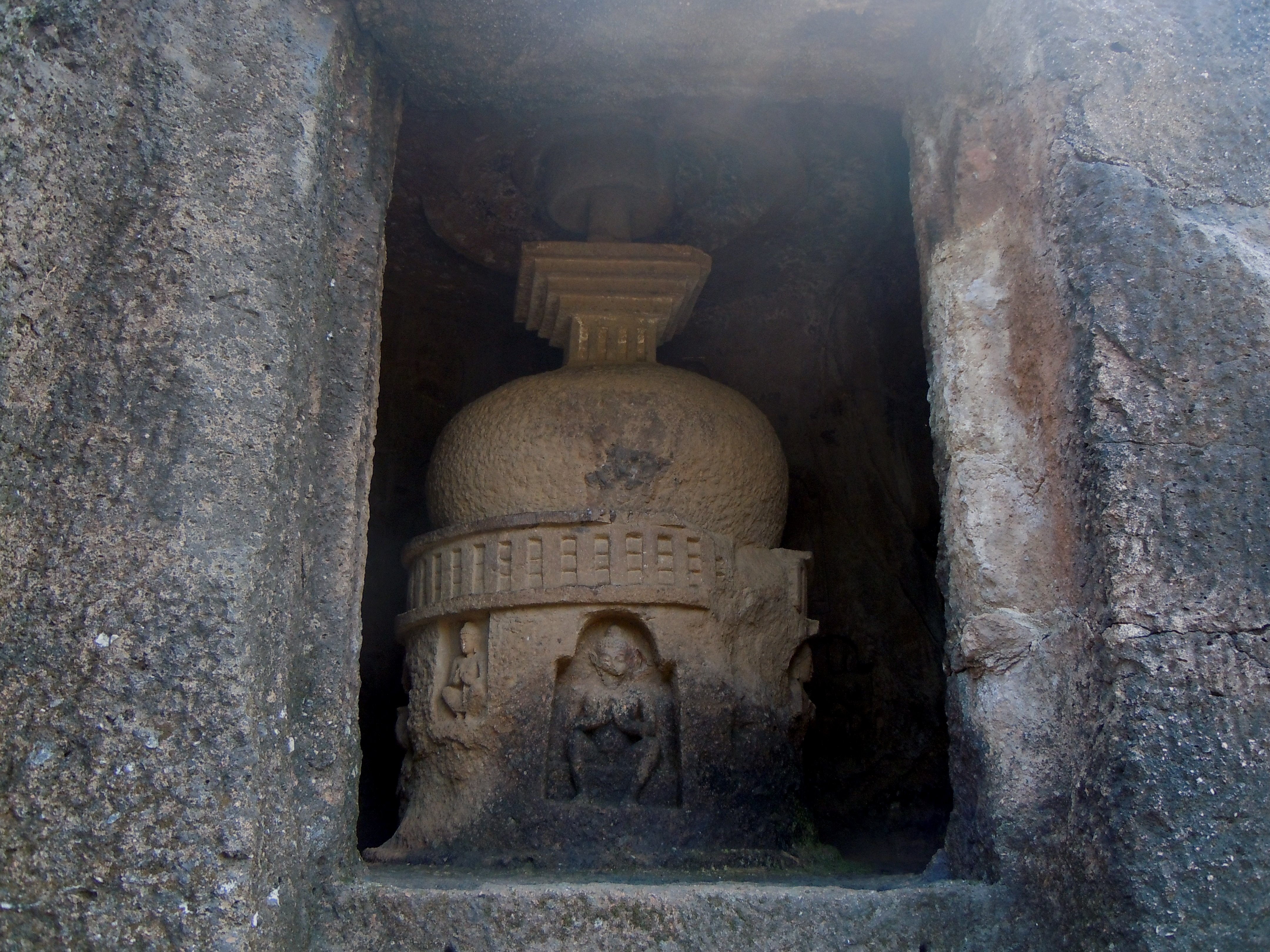 Grottes de Kanheri - Stupa de la Grotte 4 dédiée à Hanuman